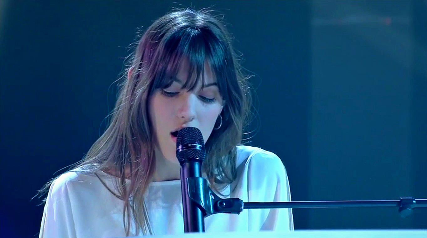 Charlotte Cardin performant un medley de ses chansons lors de la finale de La Voix Junior au Québec en 2016